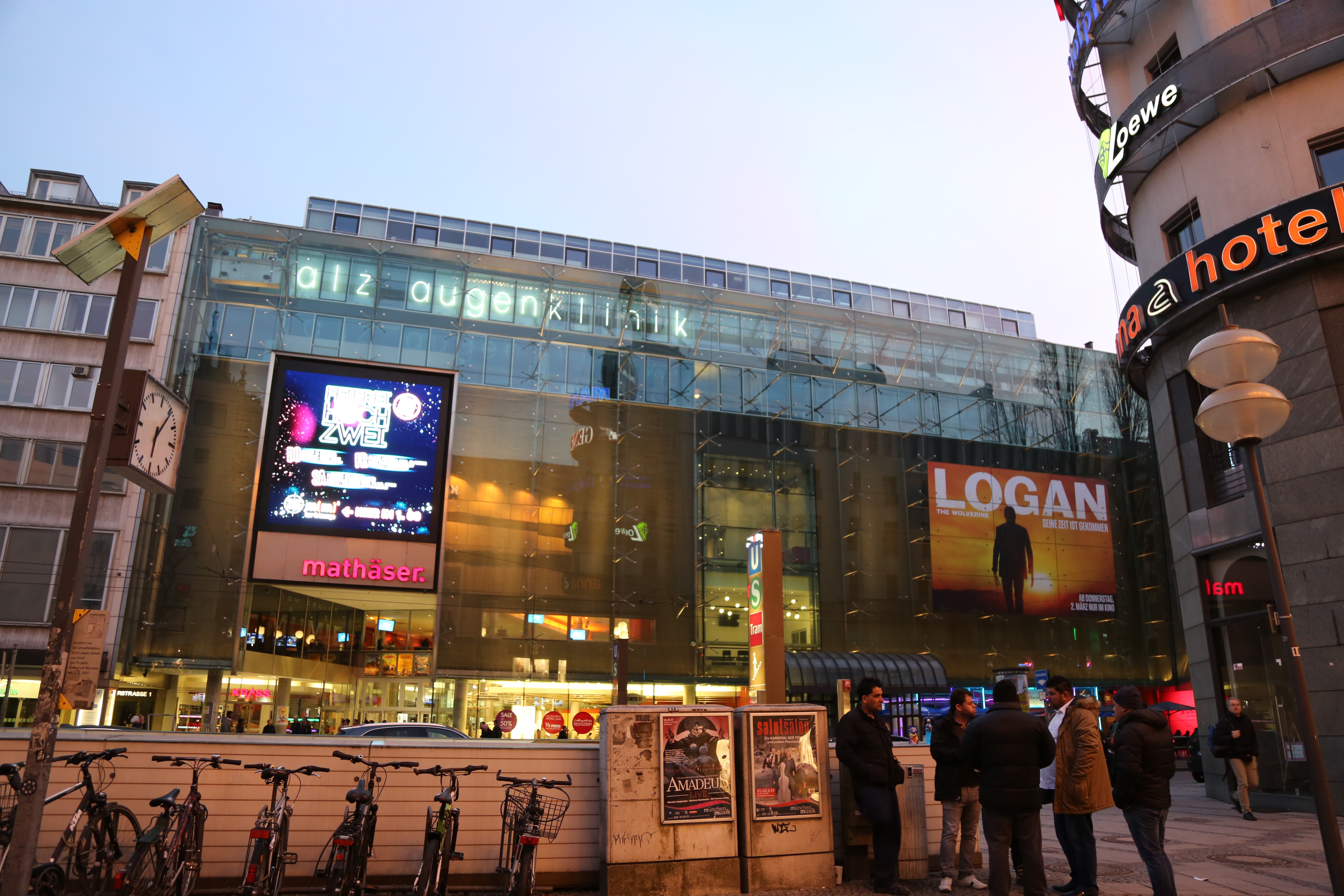 Mathäser Filmpalast in München